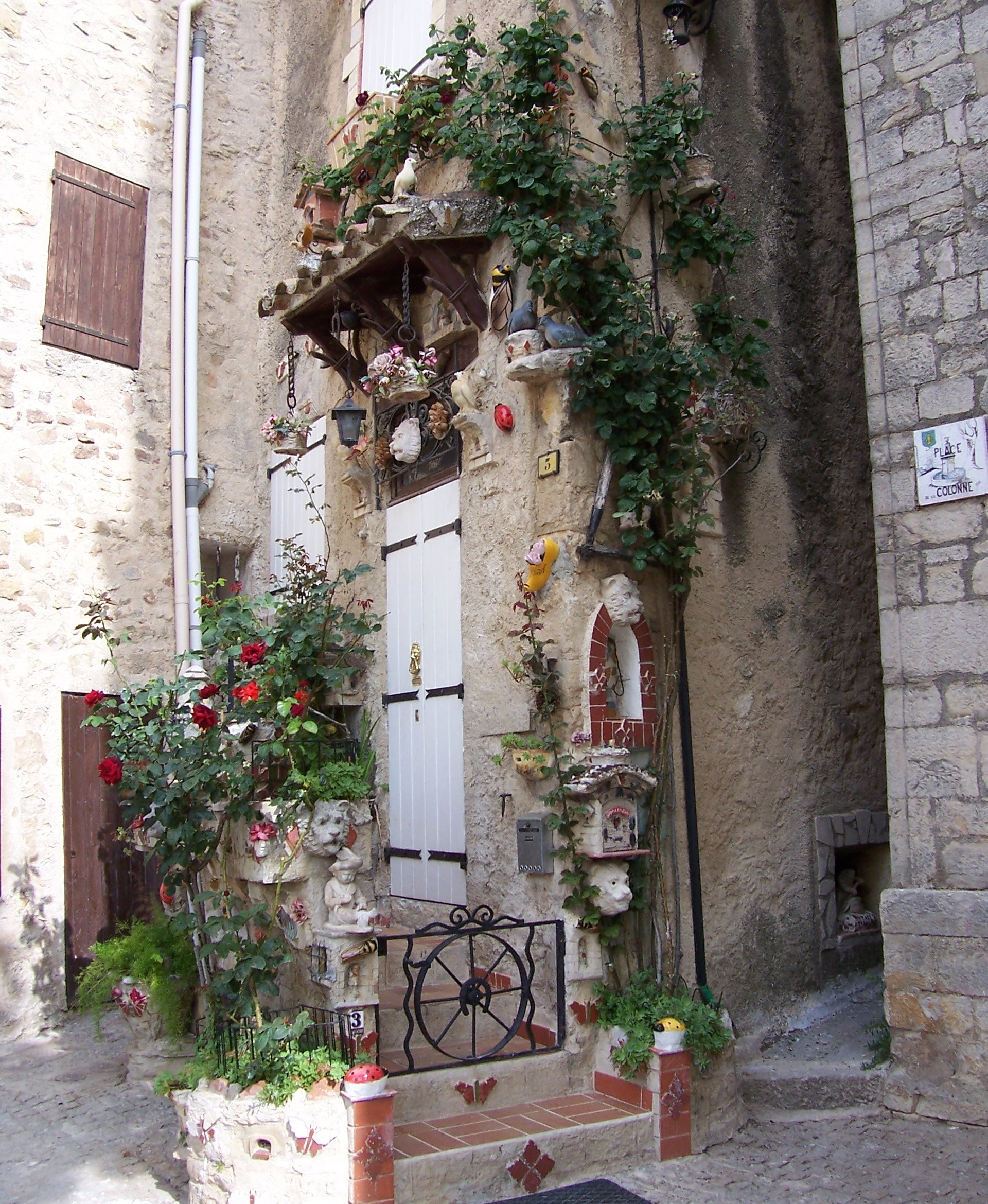 Décoration d'une maison du village de BEAUMONT-DE-PERTUIS (place Colonne).